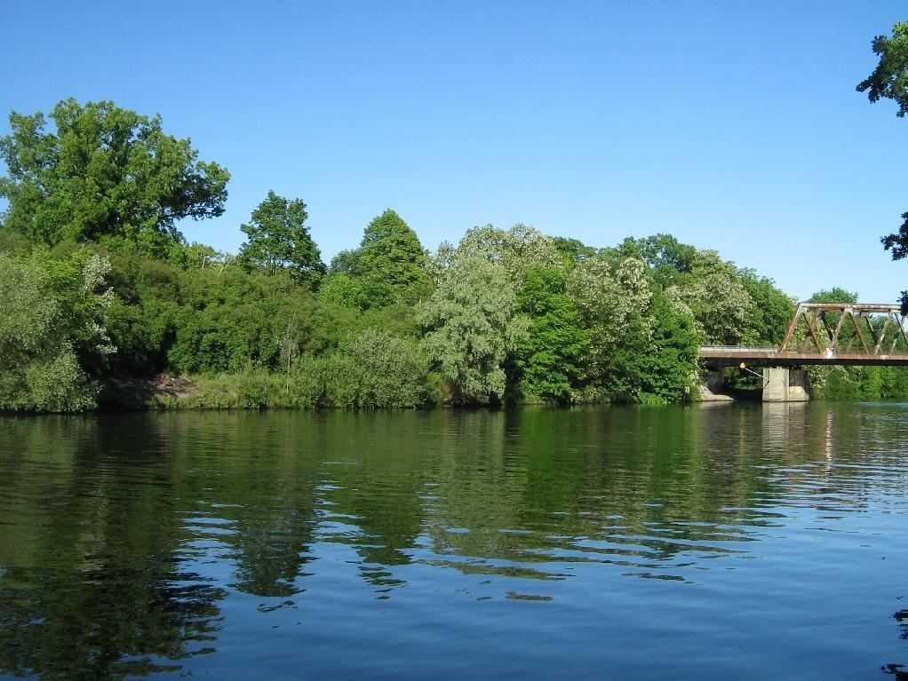 der Sacrow-Paretzer-Kanal bei Nedlitz/Potsdam (Brandenburg, Germany)